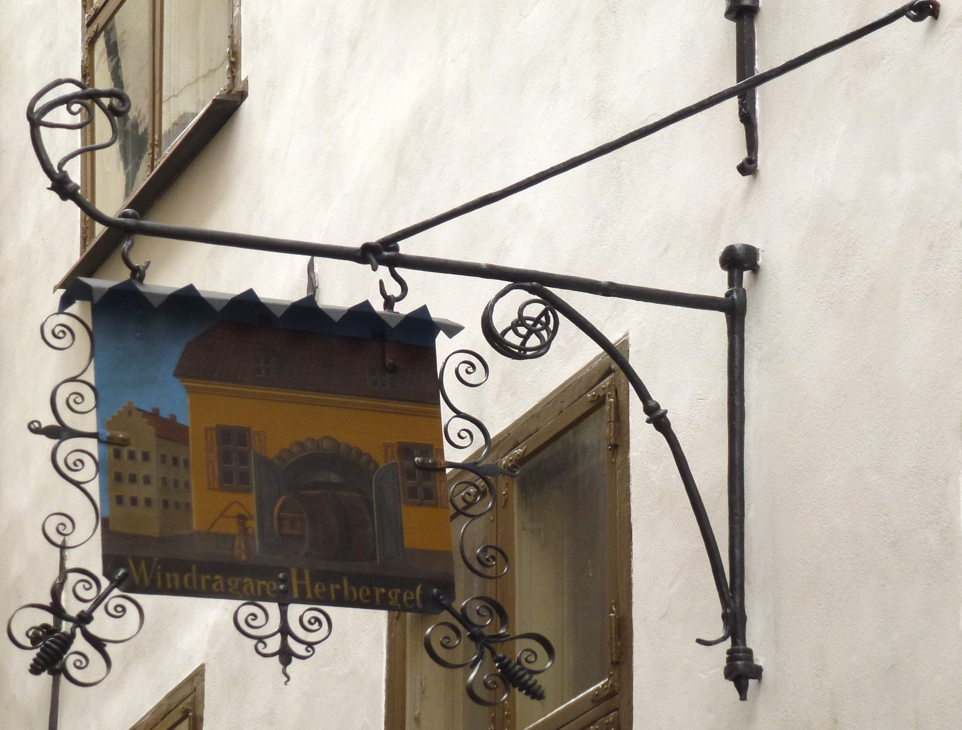 Vindragarlagets hus efter fasadrenoveringen 2011